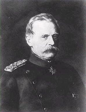 Portrait Albrecht Graf von Roon, by Gustav Gräf